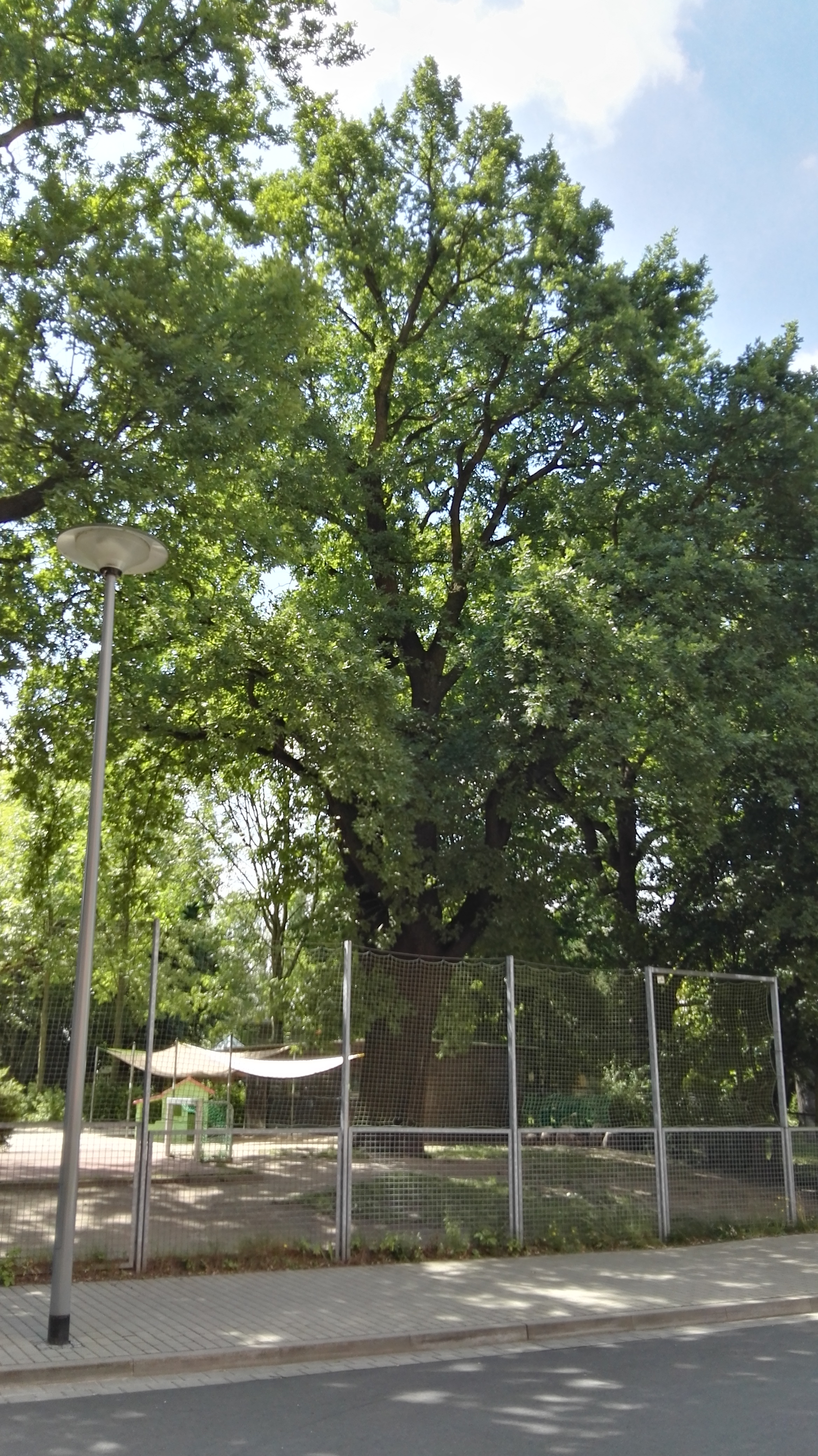 Naturdenkmal in Senftenberg Nr. 0100-6; Stieleiche (Quercus robur) im Garten des Kindergartens Glück-Auf-Straße; Teil der Baumreihe aus Eichen 0100-5 bis 0100-9